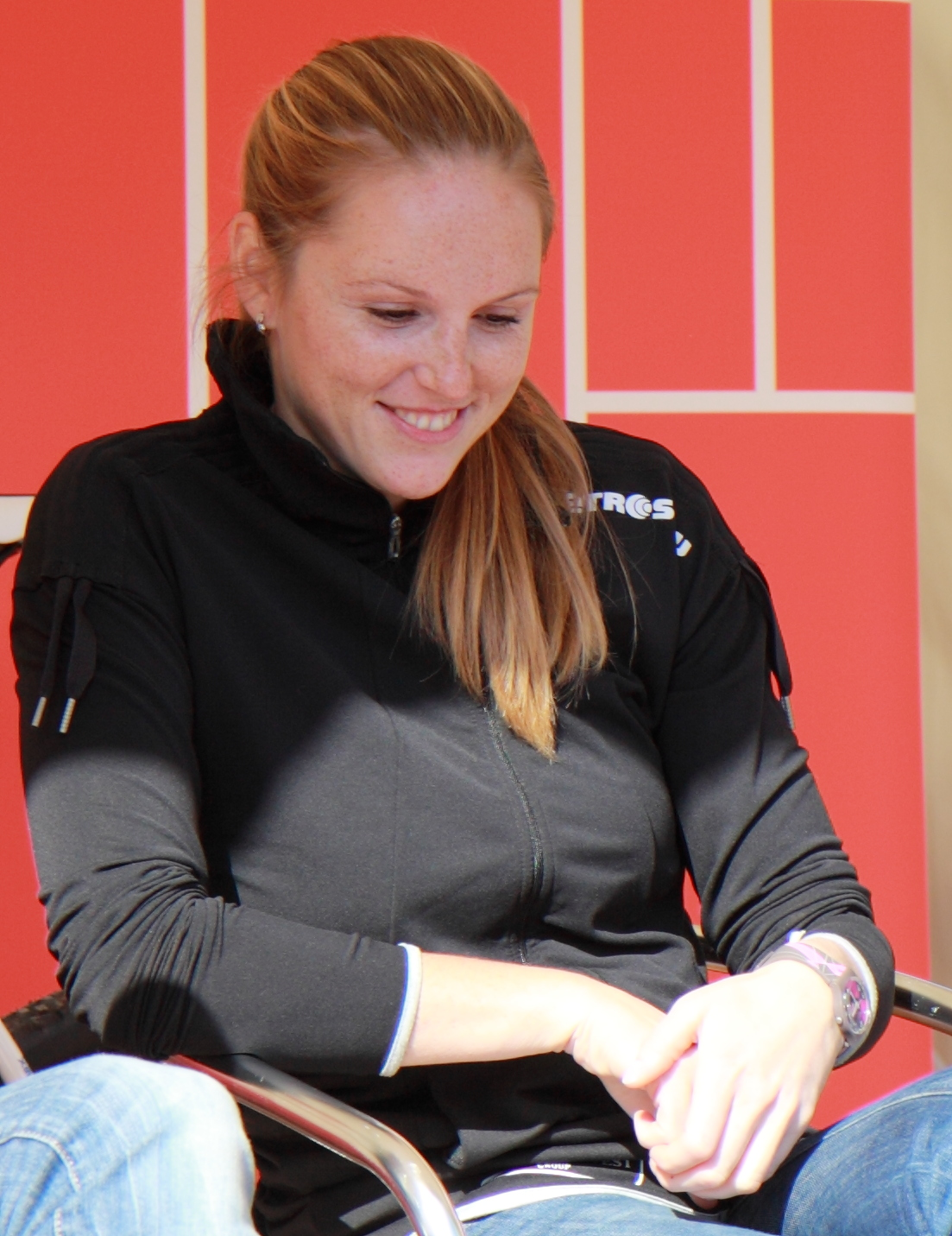 Kristýna Kolocová na autogramiádě při dni otevřených dveří tunelového komplexu Blanka